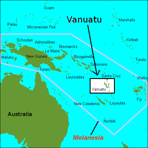 map Melanesia, Oceania